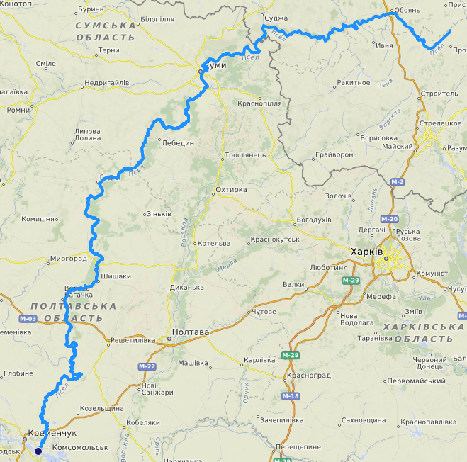 carte réalisée sur umap, [1] This map may be incomplete, and may contain errors. Don't rely solely on it for navigation.